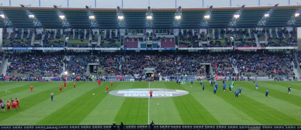 Die Haupttribüne des Karlsruher Wildparkstadions vor einem Testspiel KSC vs FC Bayern